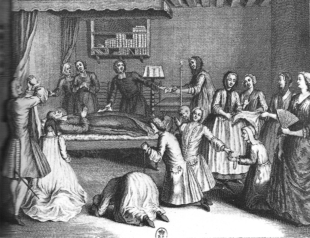 Gravure représentant la mort du diacre François de Pâris.